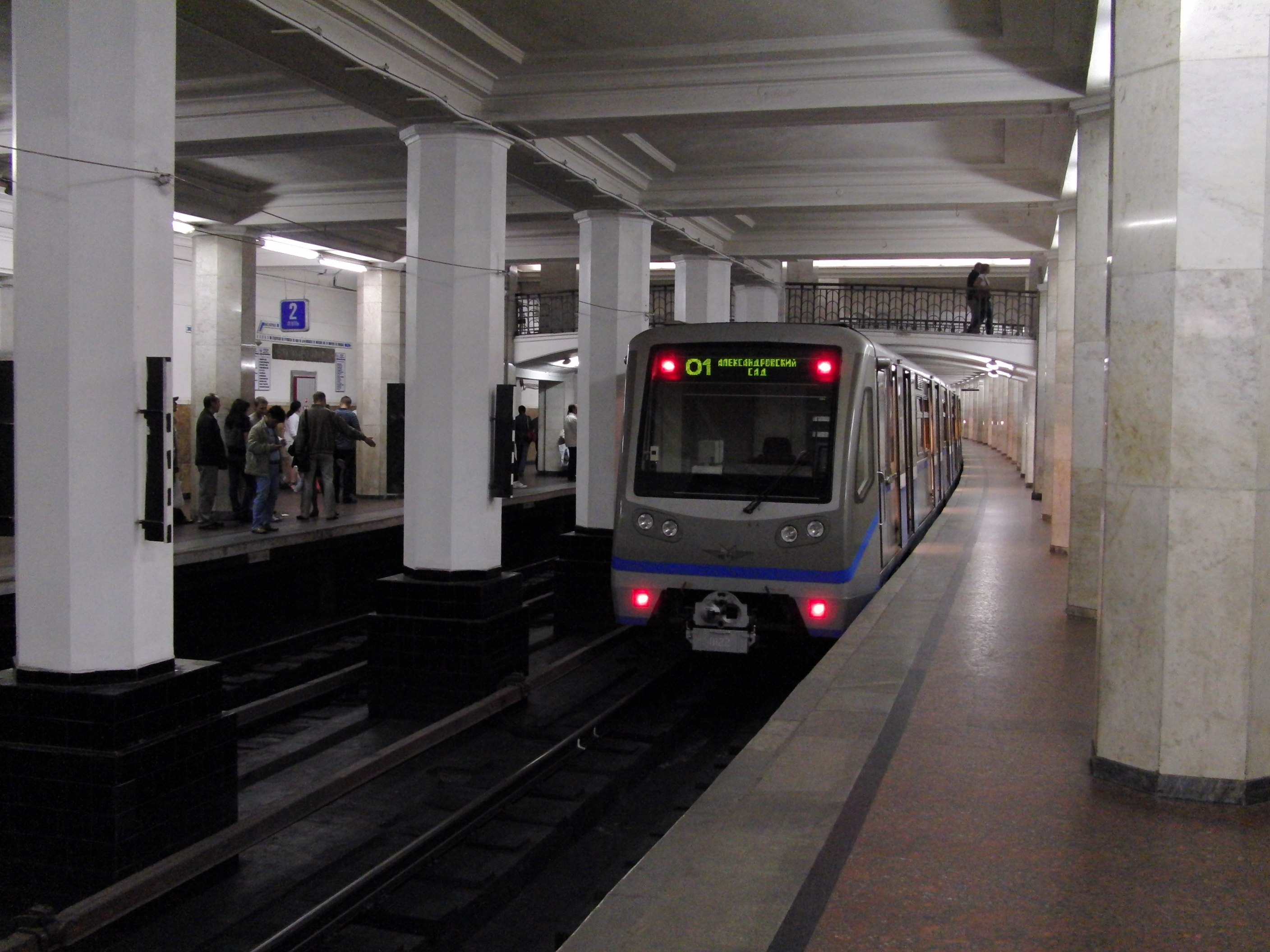 Alexandrovsky Sad (Александровский сад)